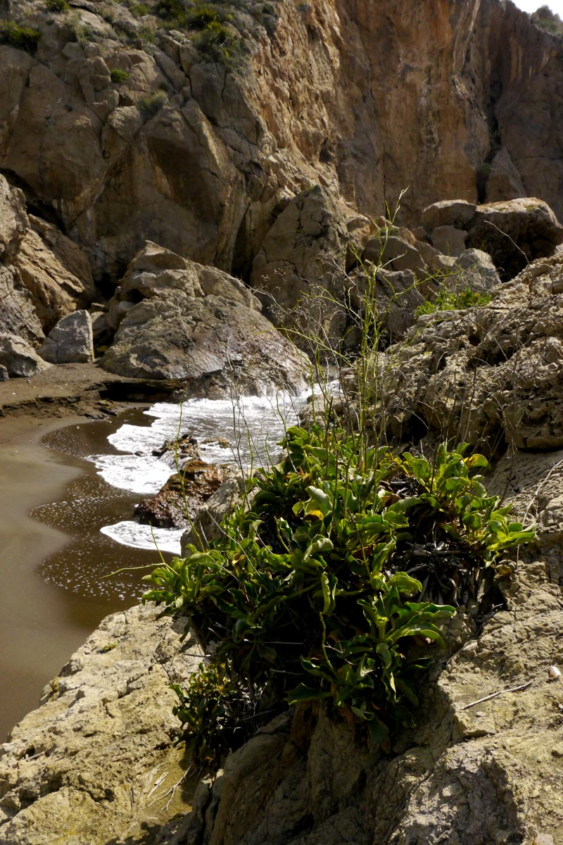 Limonium cossonianum en El Gorguel (Cartagena, España)